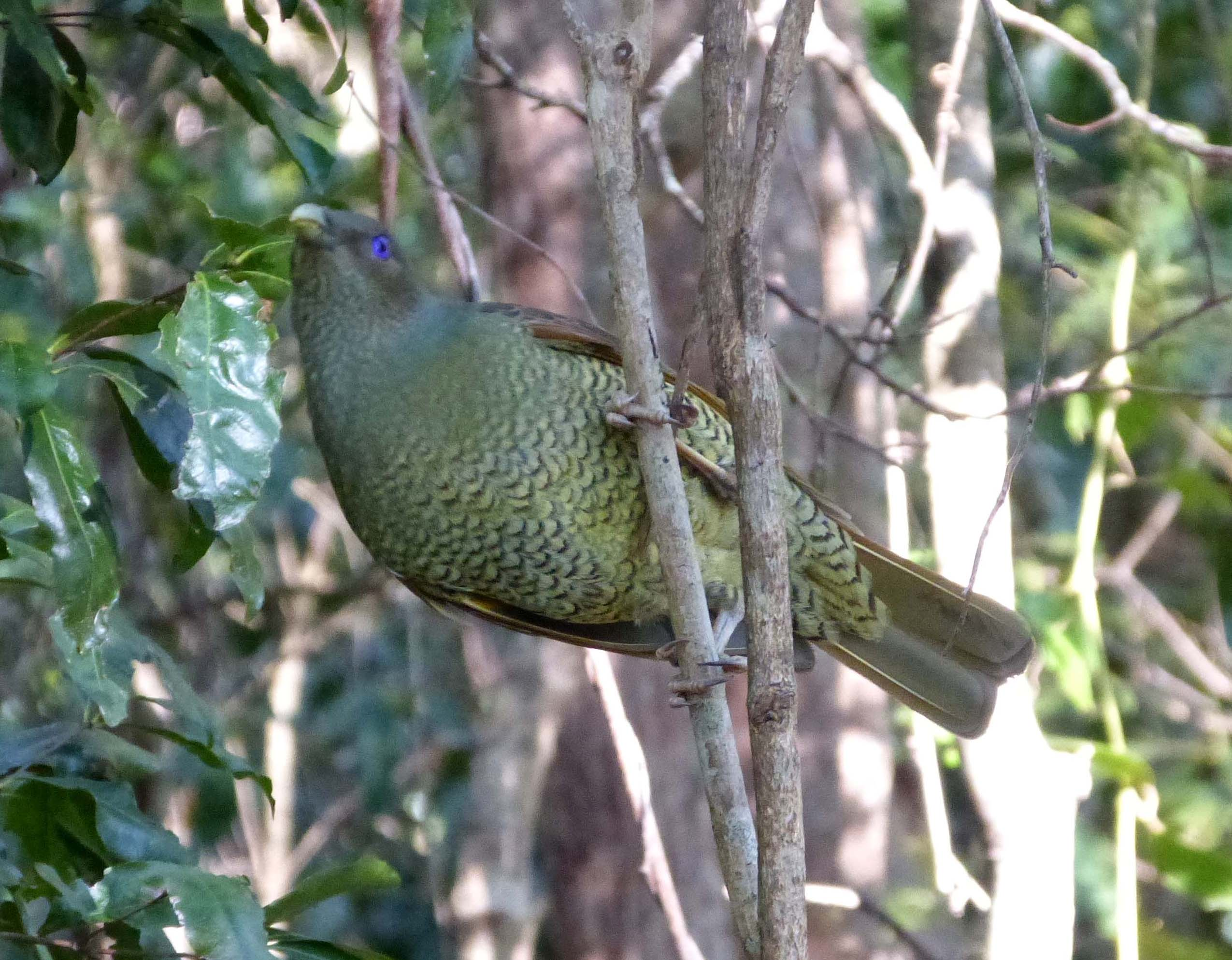 Binna Burra. Lamington N.P. QLD